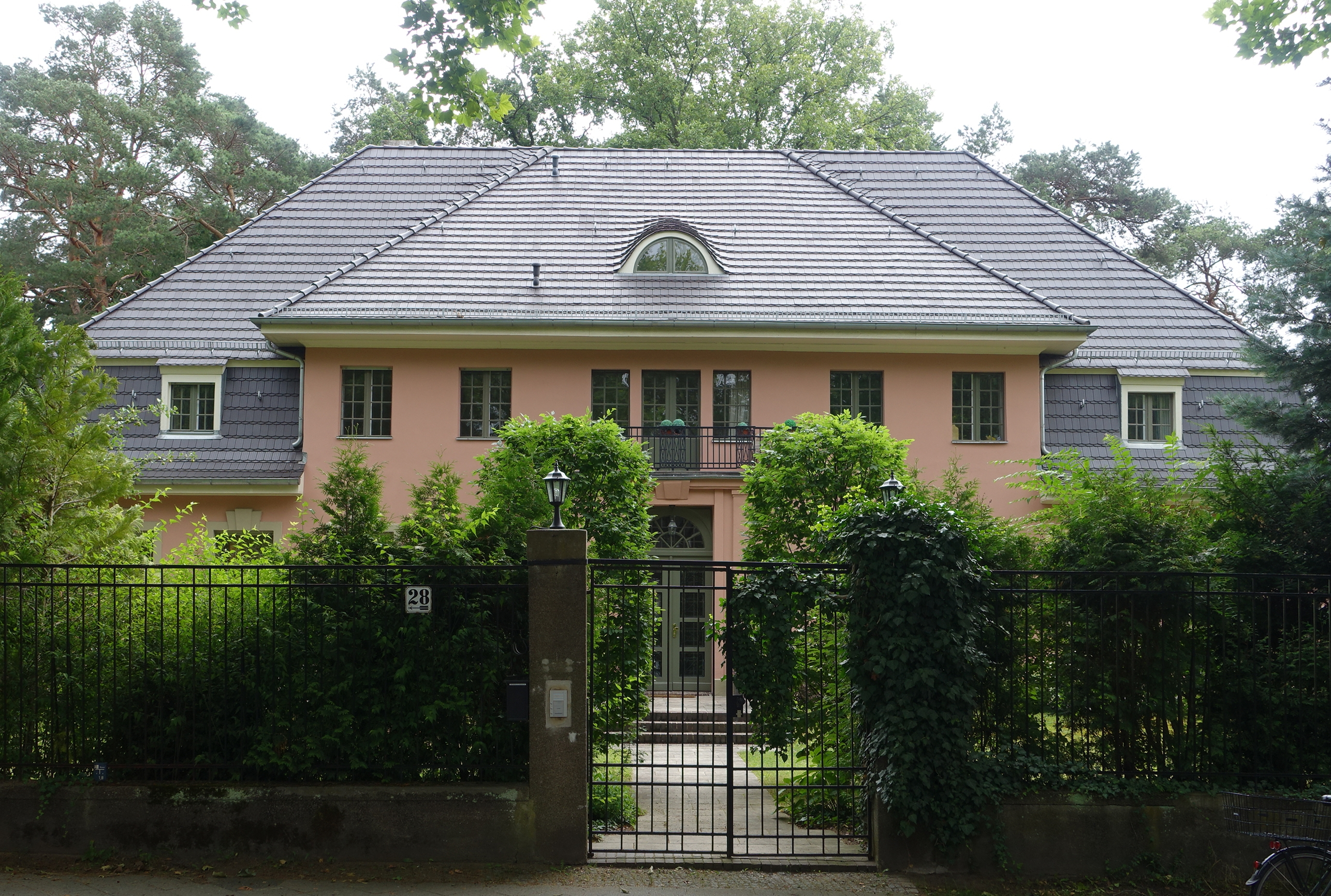 Wohnhaus